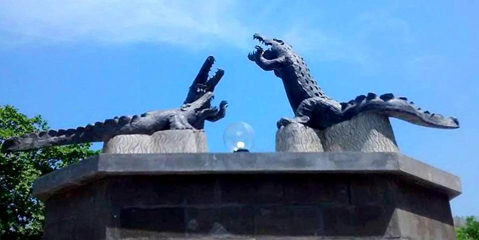 Dili